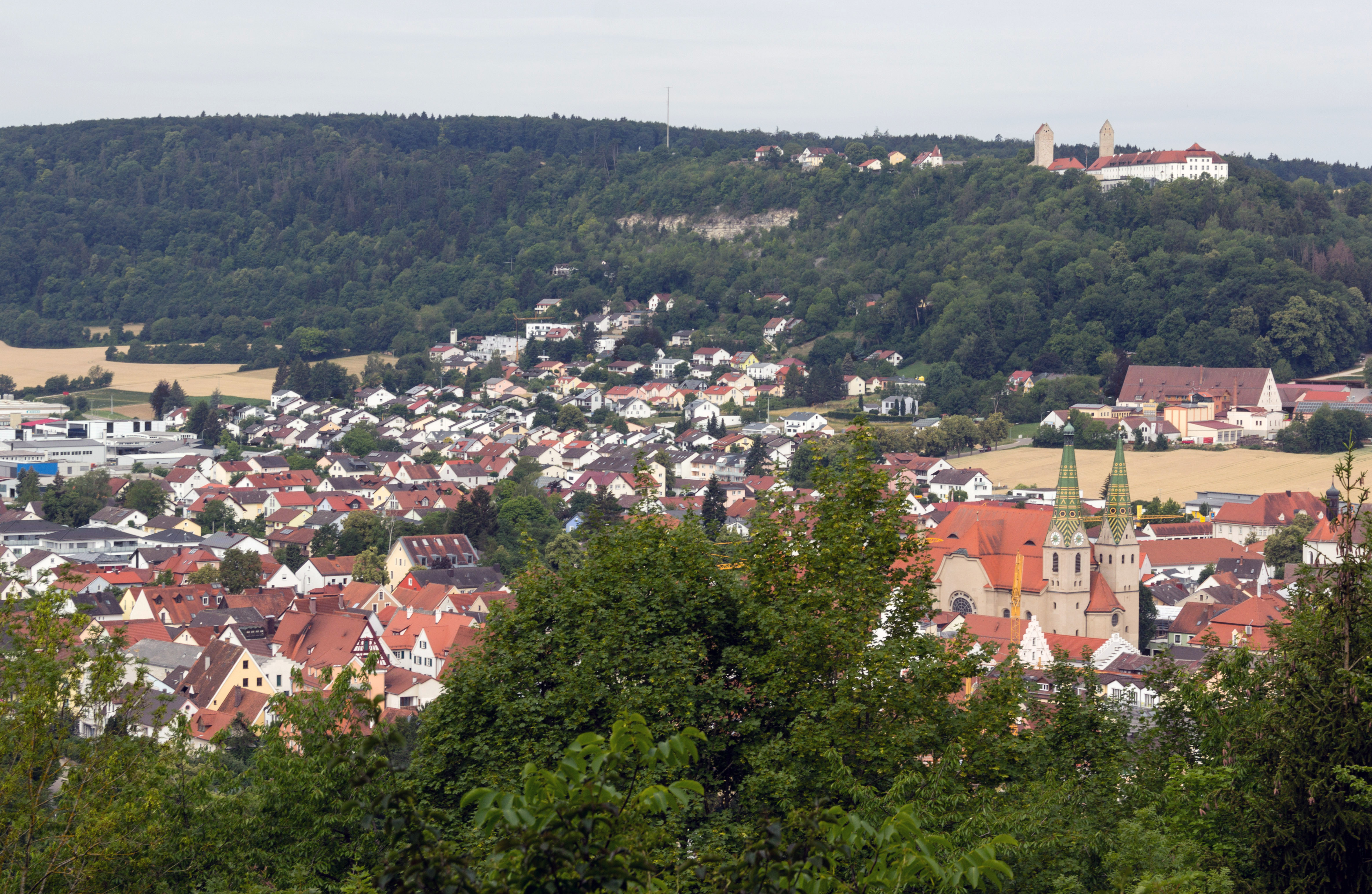 Beilngries, Steinbrüche am Hirschberg, Geotop